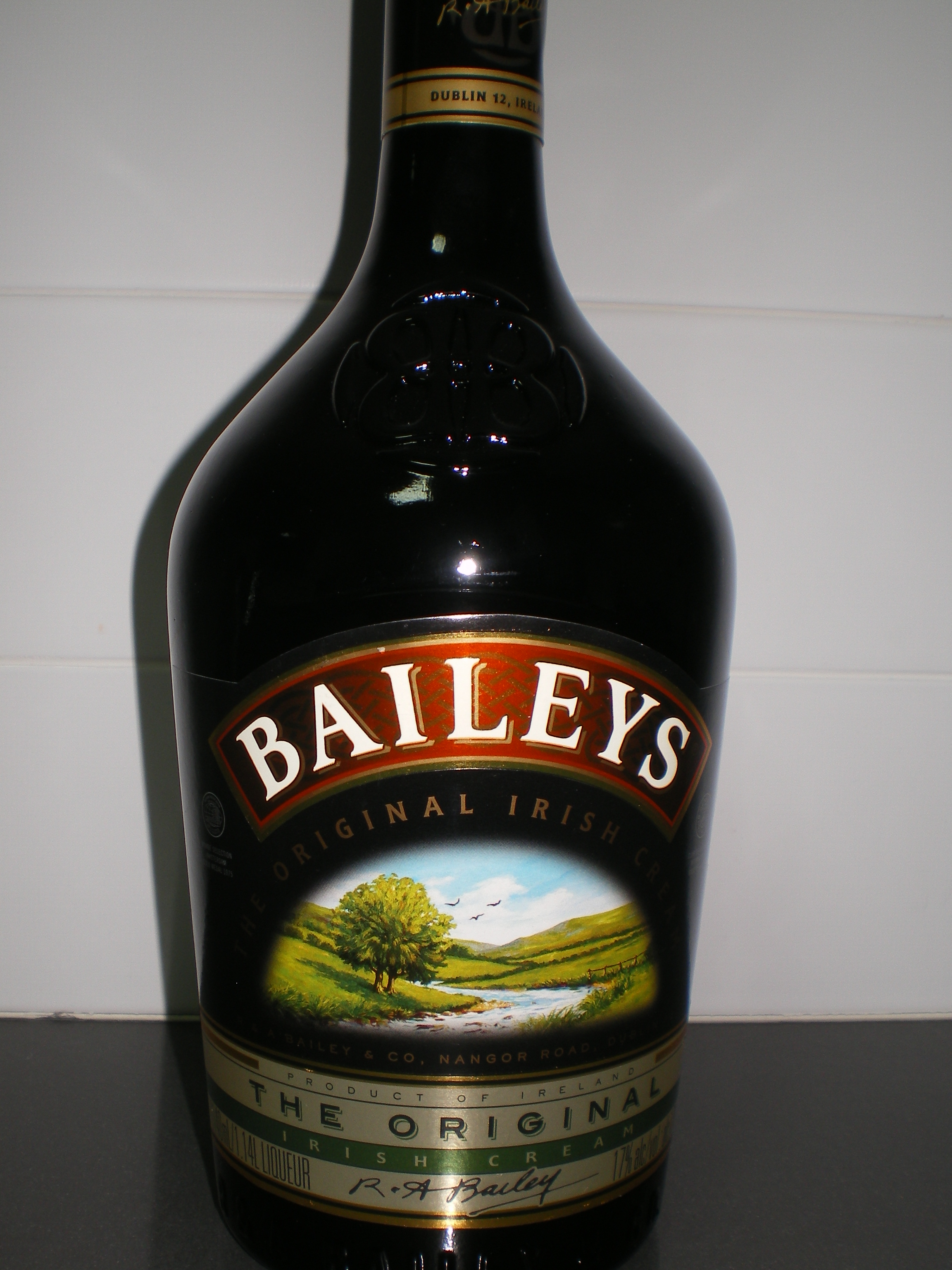 בייליס אייריש קרים